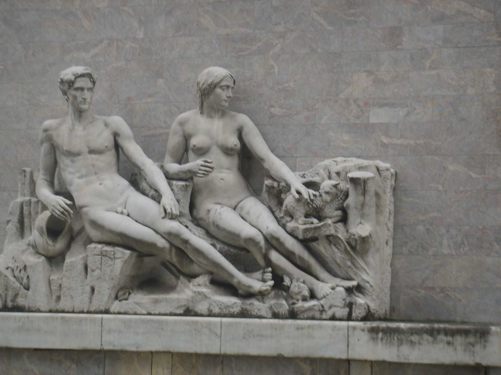 L'Arno e la sua valle. Fontana della Palazzina Reale (1935), stazione di Firenze